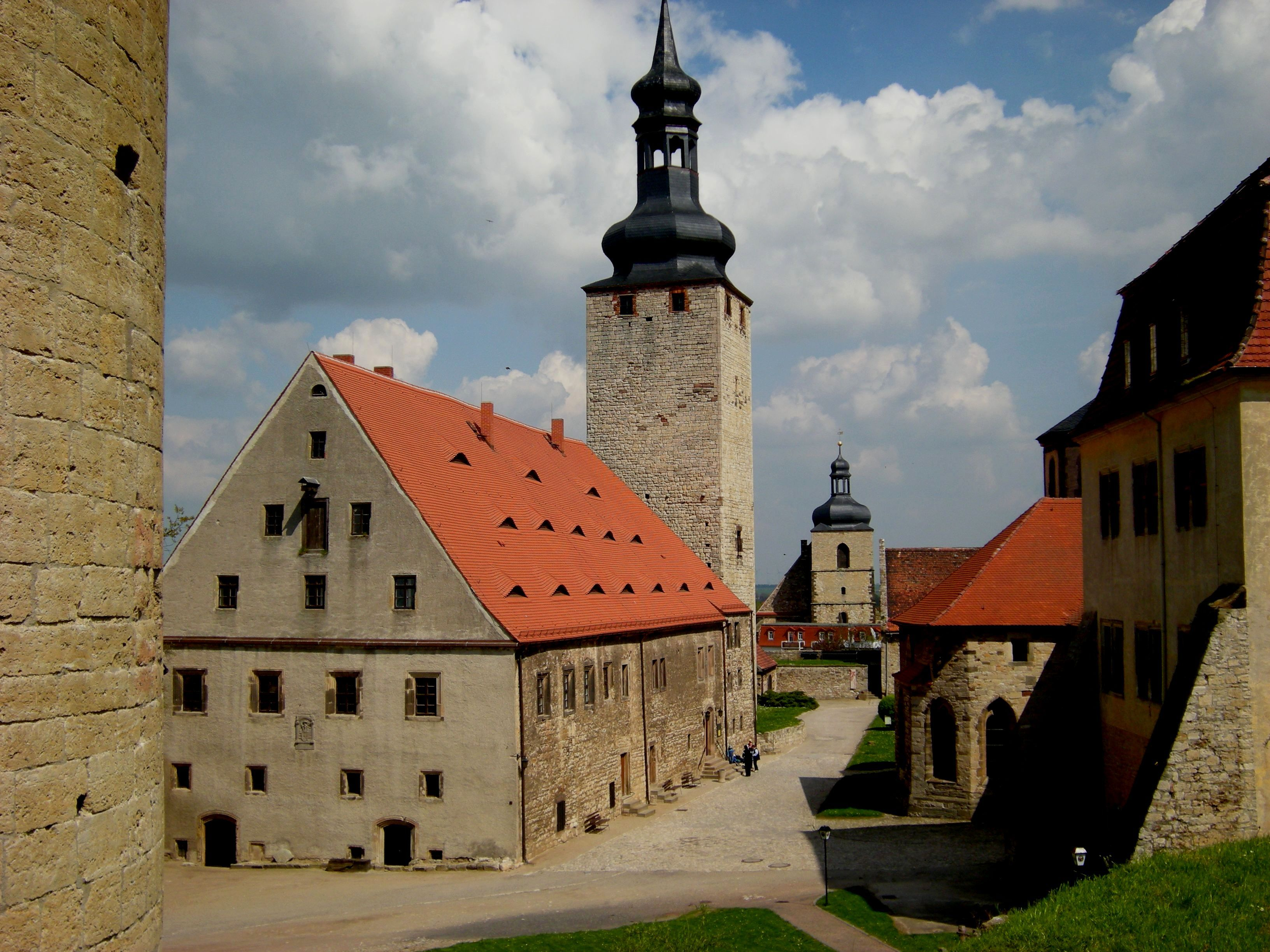 Querfurt - Burghof mit Gebäuden.jpg